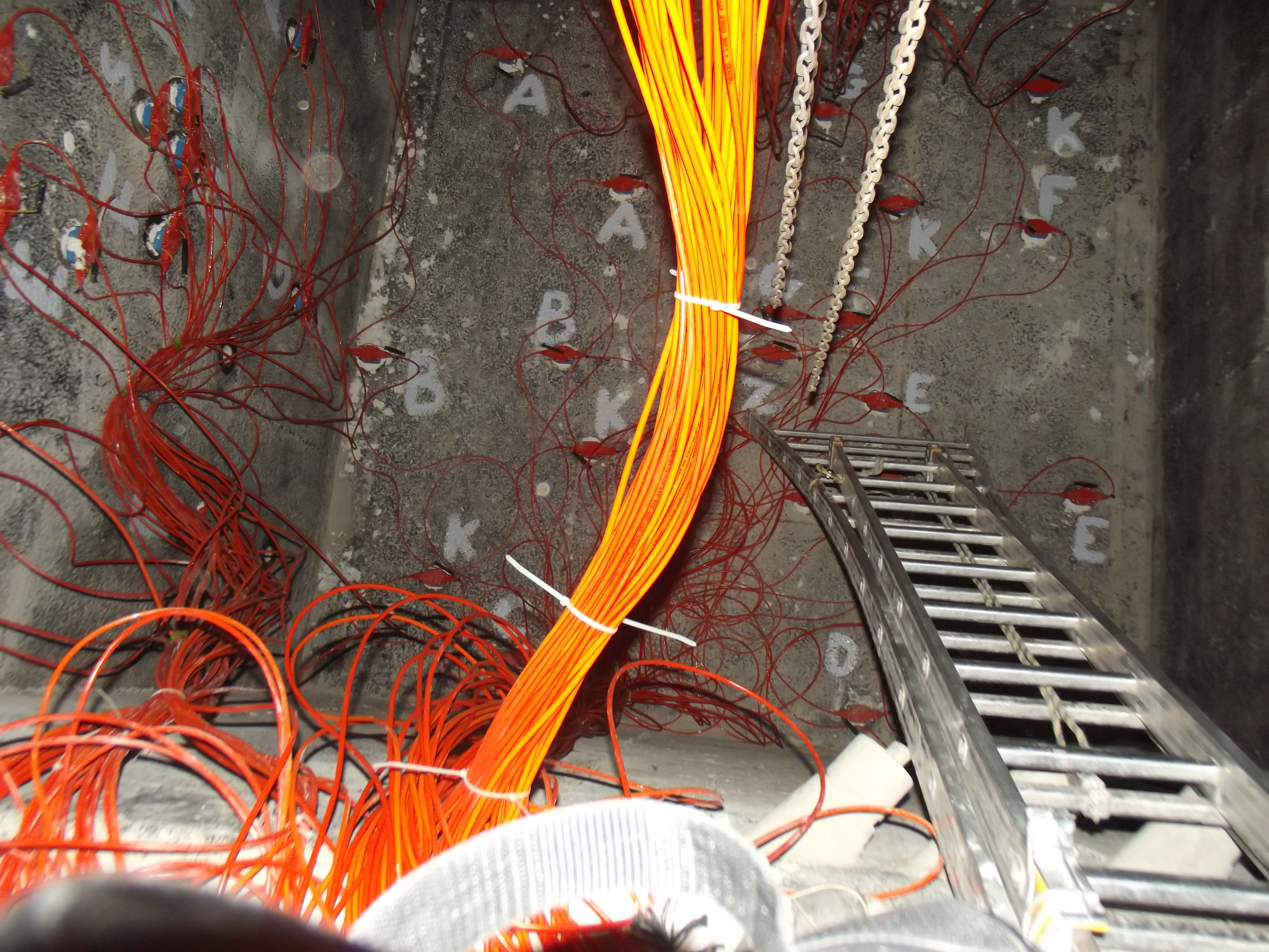 Accélérometres